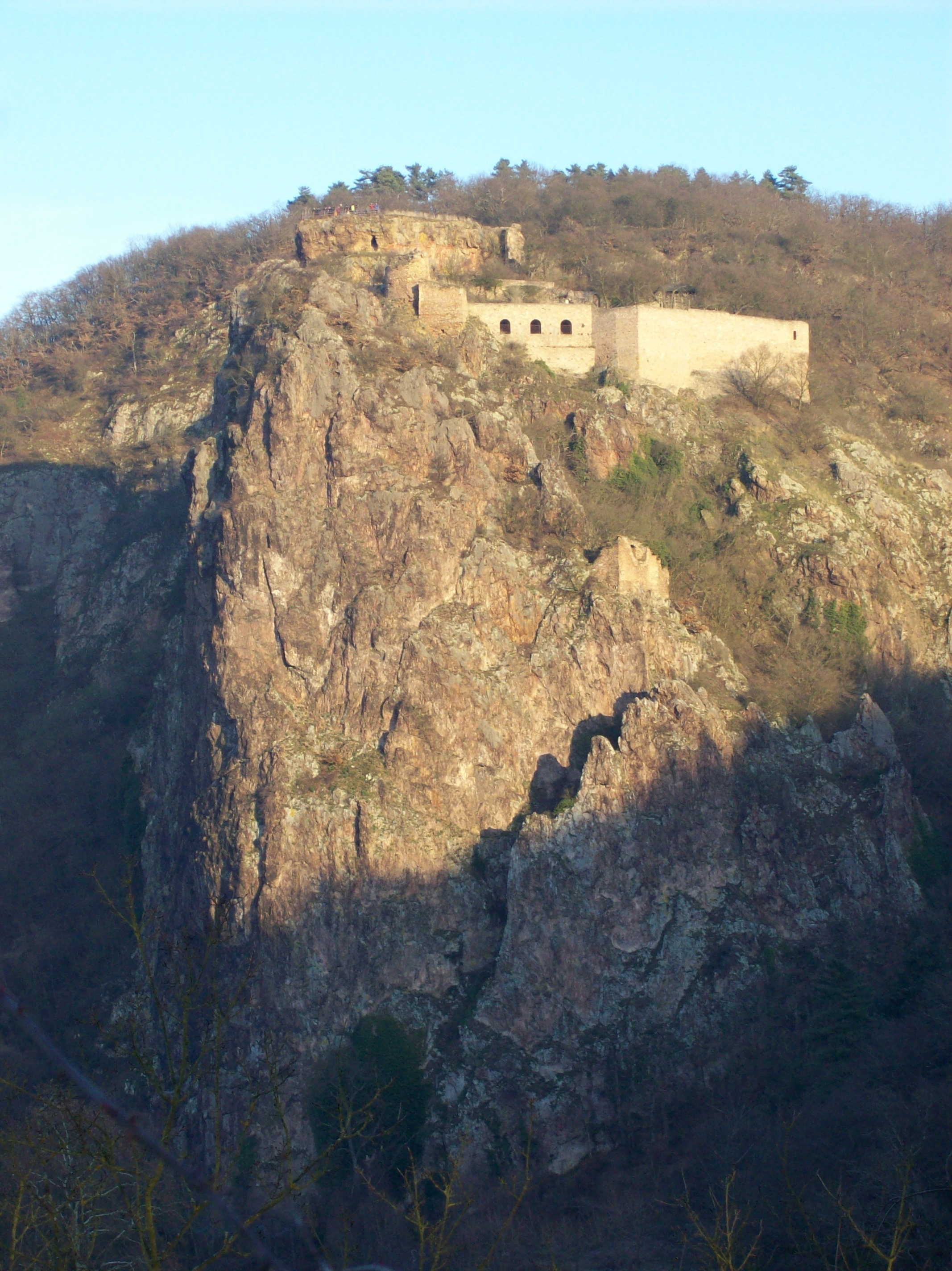 Rheingrafenstein mit Burgruine Rheingrafenstein und Vorburg Affenstein, Bad Münster am Stein